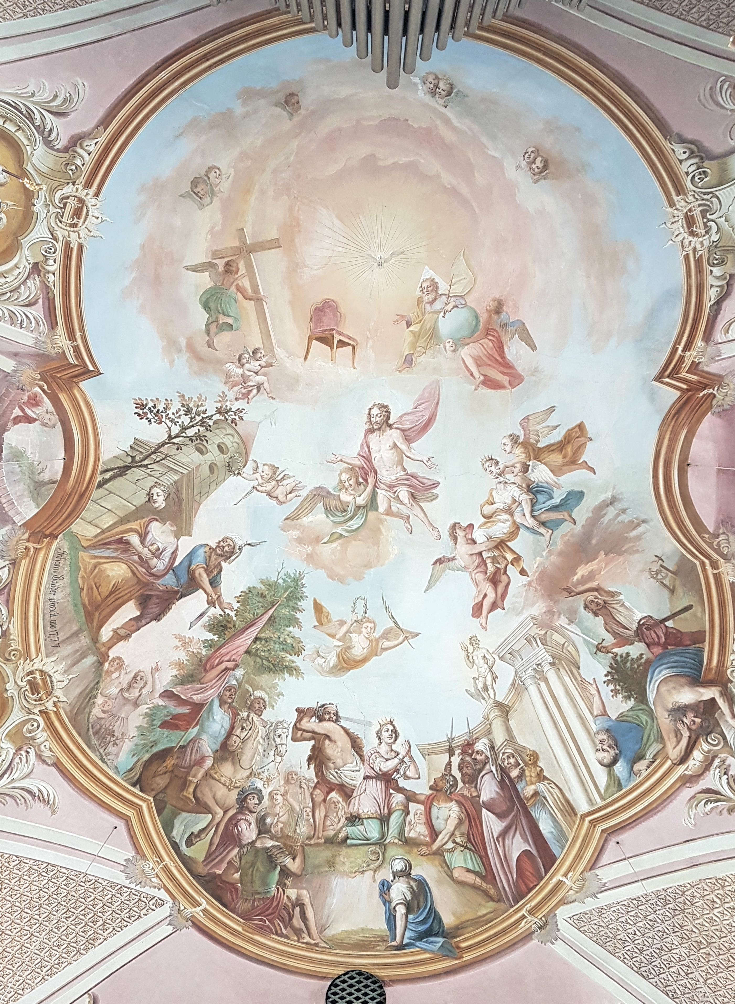 Issing (Vilgertshofen), Pfarrkirche St. Margaretha, Fresko am Langhausgewölbe mit der Darstellung Die Martyrien der Hl. Margaretha, Barbara und Katharina (1777, J.B. Baader).